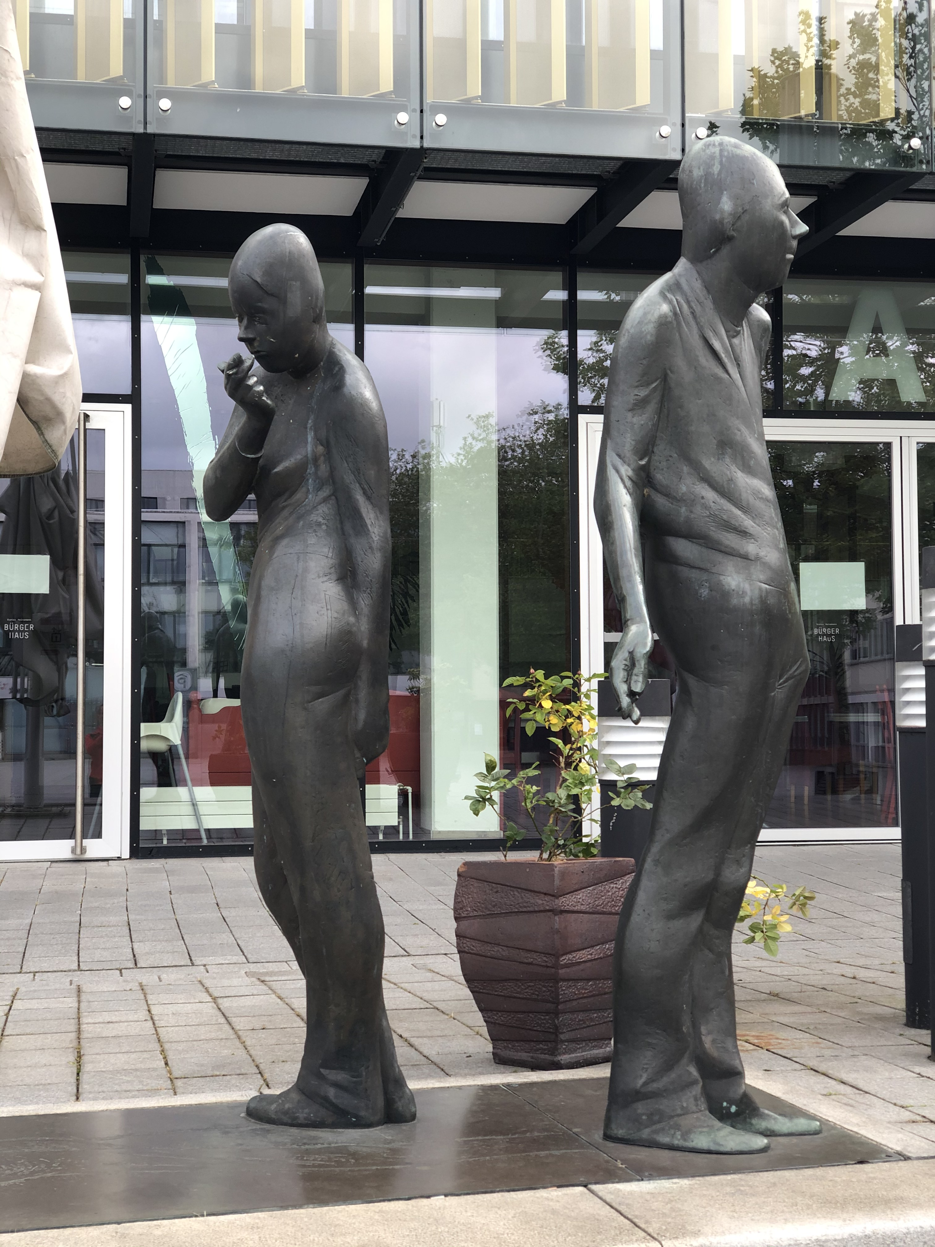 Denkmal "Begegnung" in Bremen-Vegesack von Waldemar Otto, Standort Sedanplatz vor dem Gustav-Heinemann-Bürgerhaus